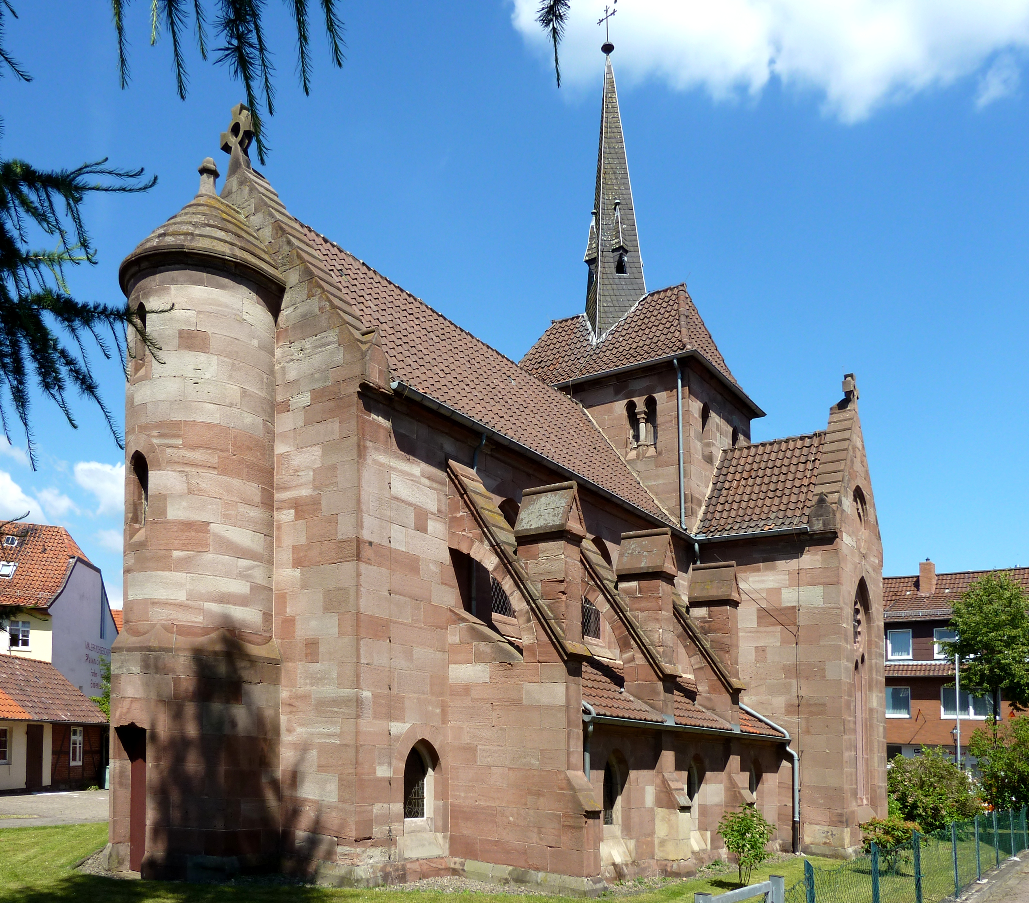 Ev.-luth. Gustav-Adolf-Kirche in Gieboldehausen, Landkreis Göttingen, Niedersachsen. Kleine neugotische Kirche, aufgebaut wie eine dreischiffige Basilika, Entwurf 1877 durch Conrad Wilhelm Hase. Ansicht von Südwesten